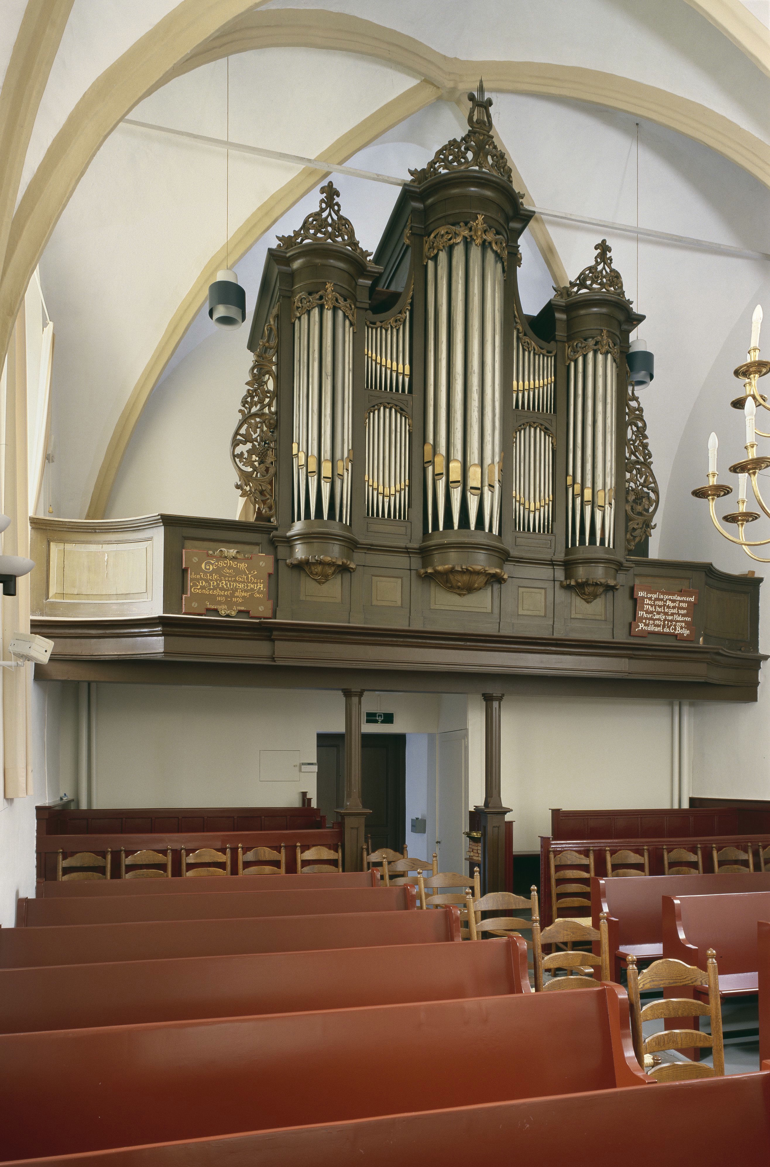 Nederlands Hervormde Kerk: Interieur, aanzicht orgel (opmerking: Gefotografeerd voor Het Historische Orgel in Nederland 1894-1901, bladzijde 363)